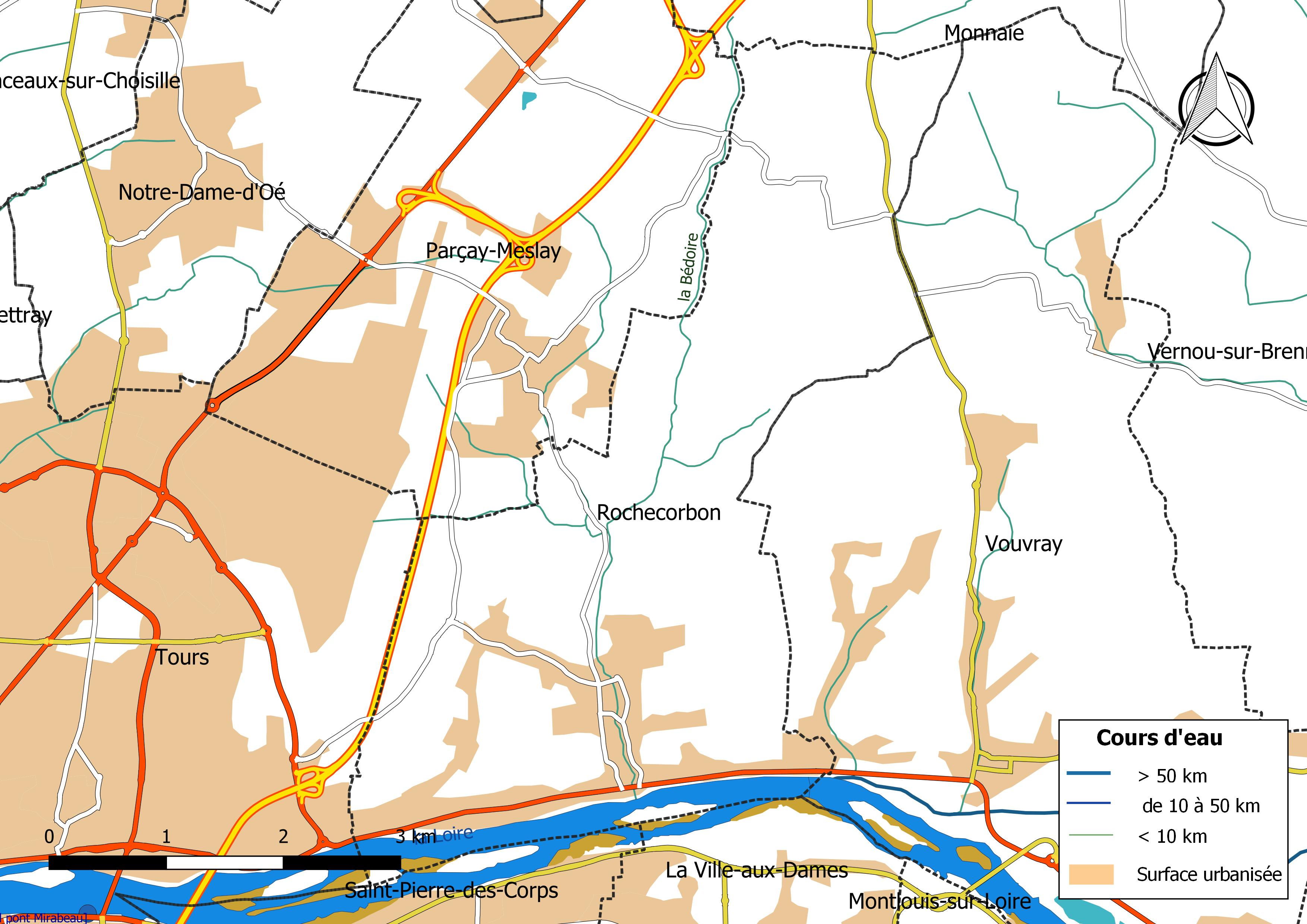 Carte du réseau hydrographique de la commune de Rochecorbon (France).